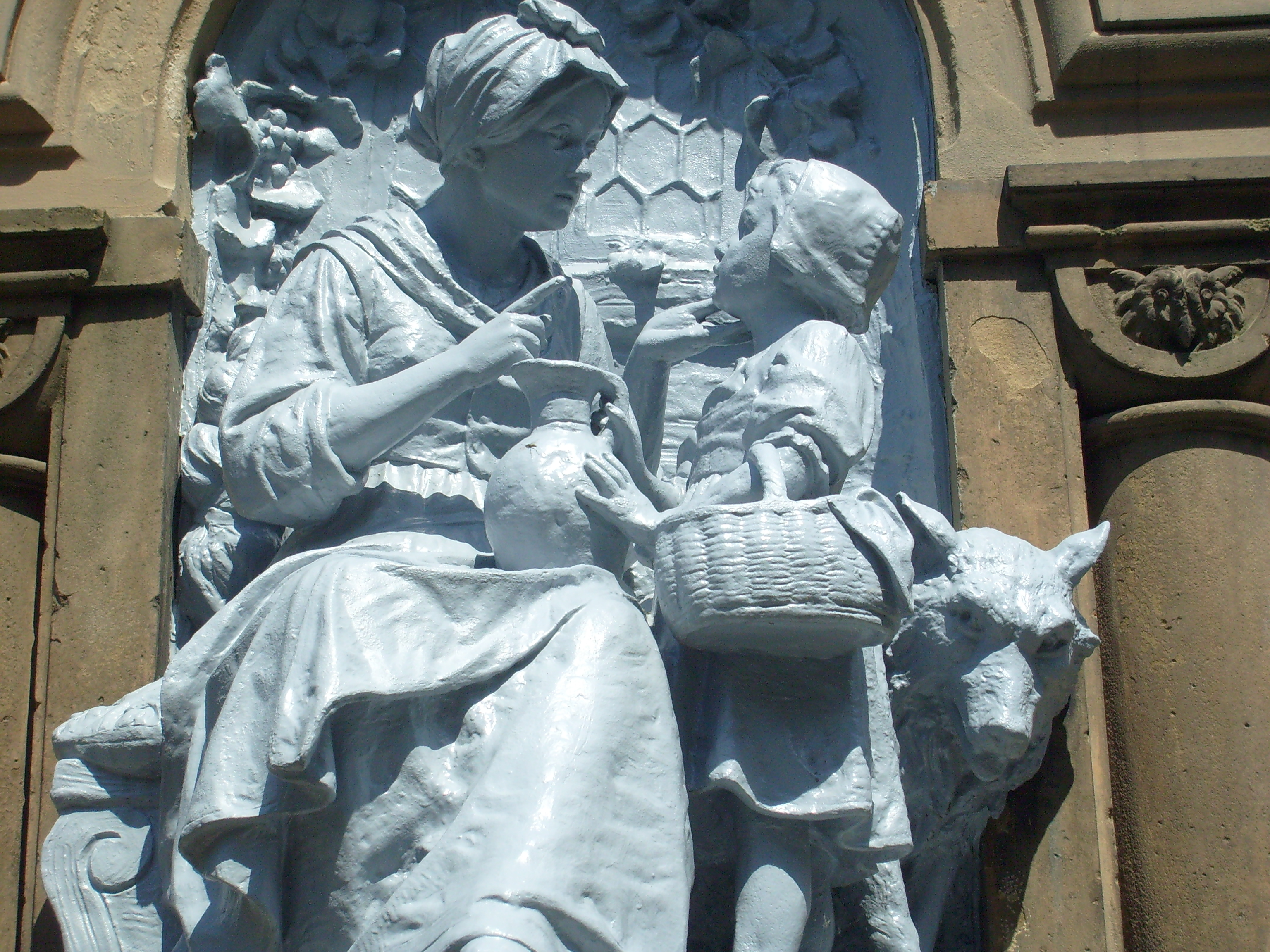 Märchenbrunnen im Zooviertel Wuppertal. Rotkäppchen und der Wolf.